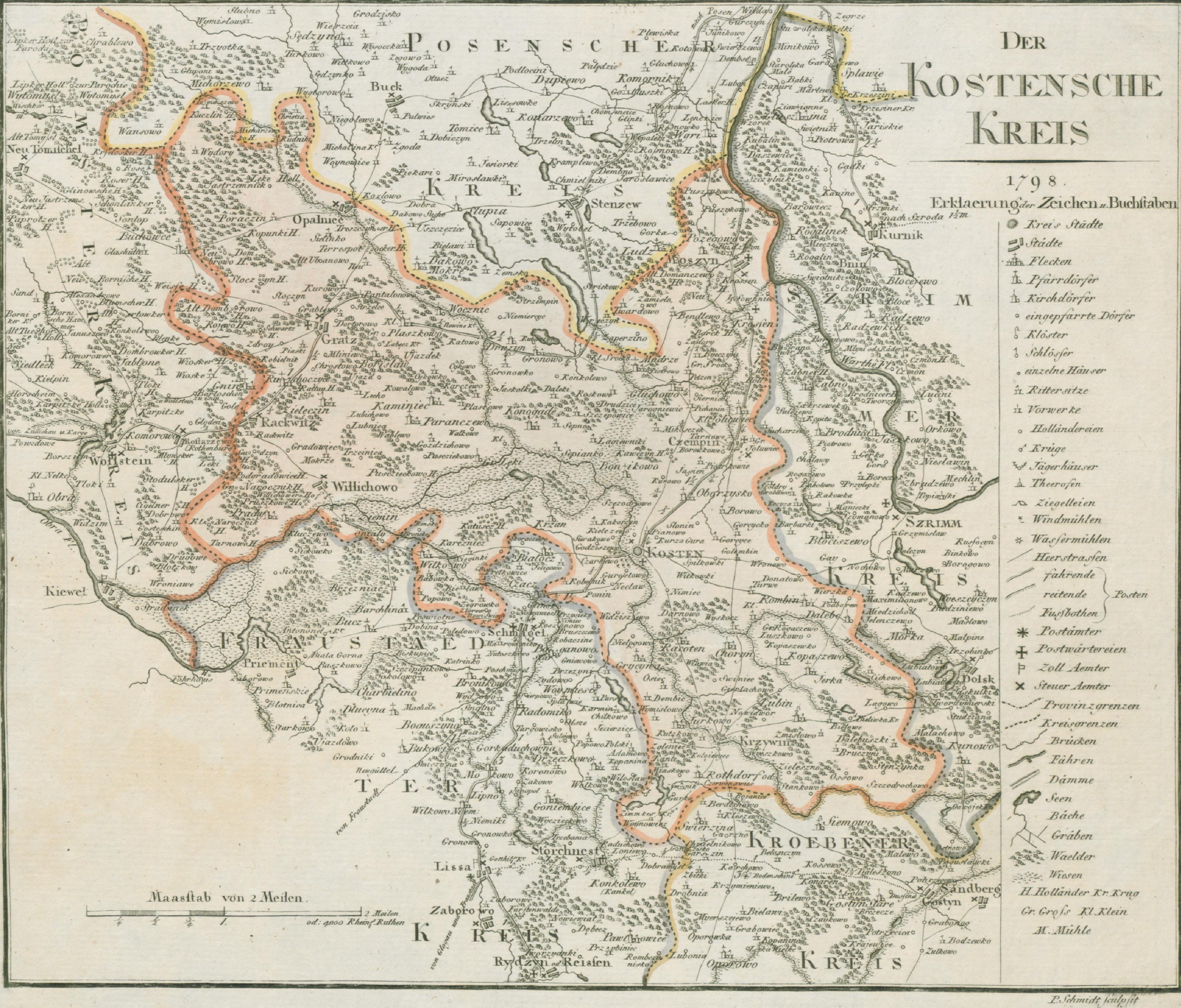 Map of "Kreis Kosten" as of 1798